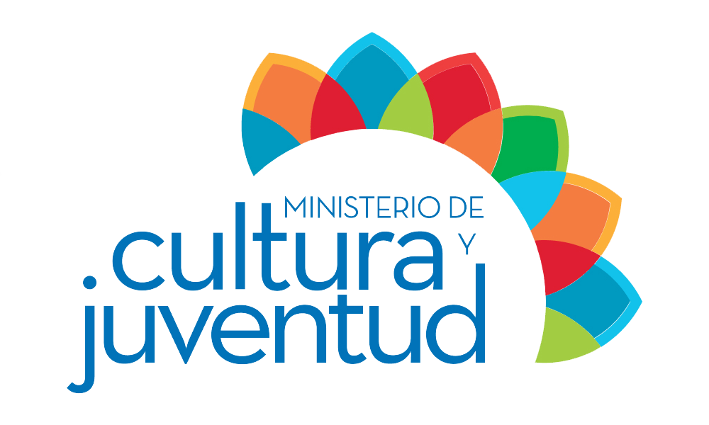 Logo del Ministerio de Cultura y Juventud (MCJ) de Costa Rica.